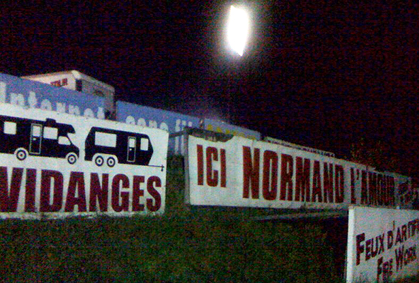 Une affiche devant le restaurant Le Madrid sur l'autoroute 20 près à Saint-Léonard-d'Aston, Québec, annonçant la présence du chanteur Normand L'Amour